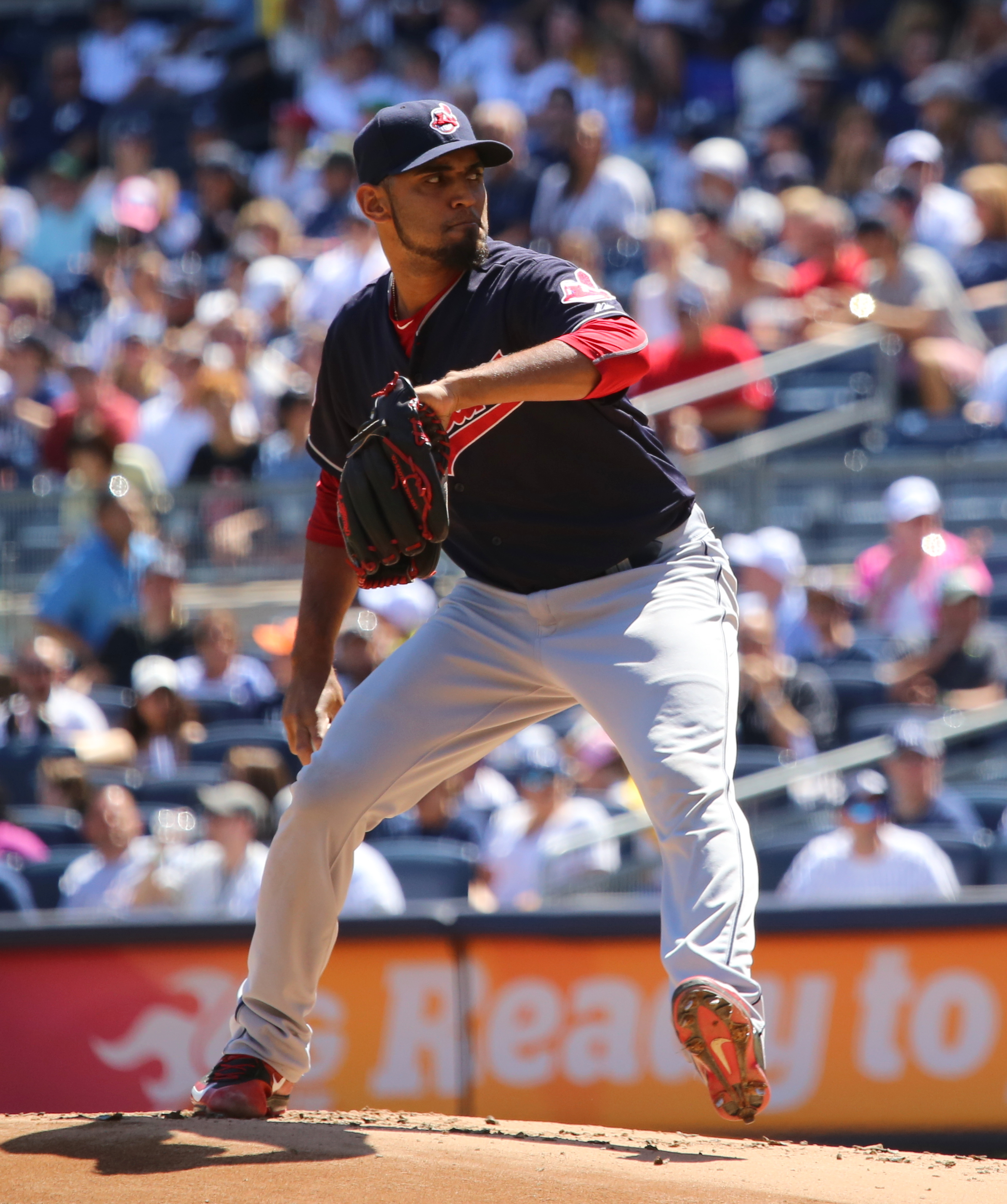 Danny Salazar